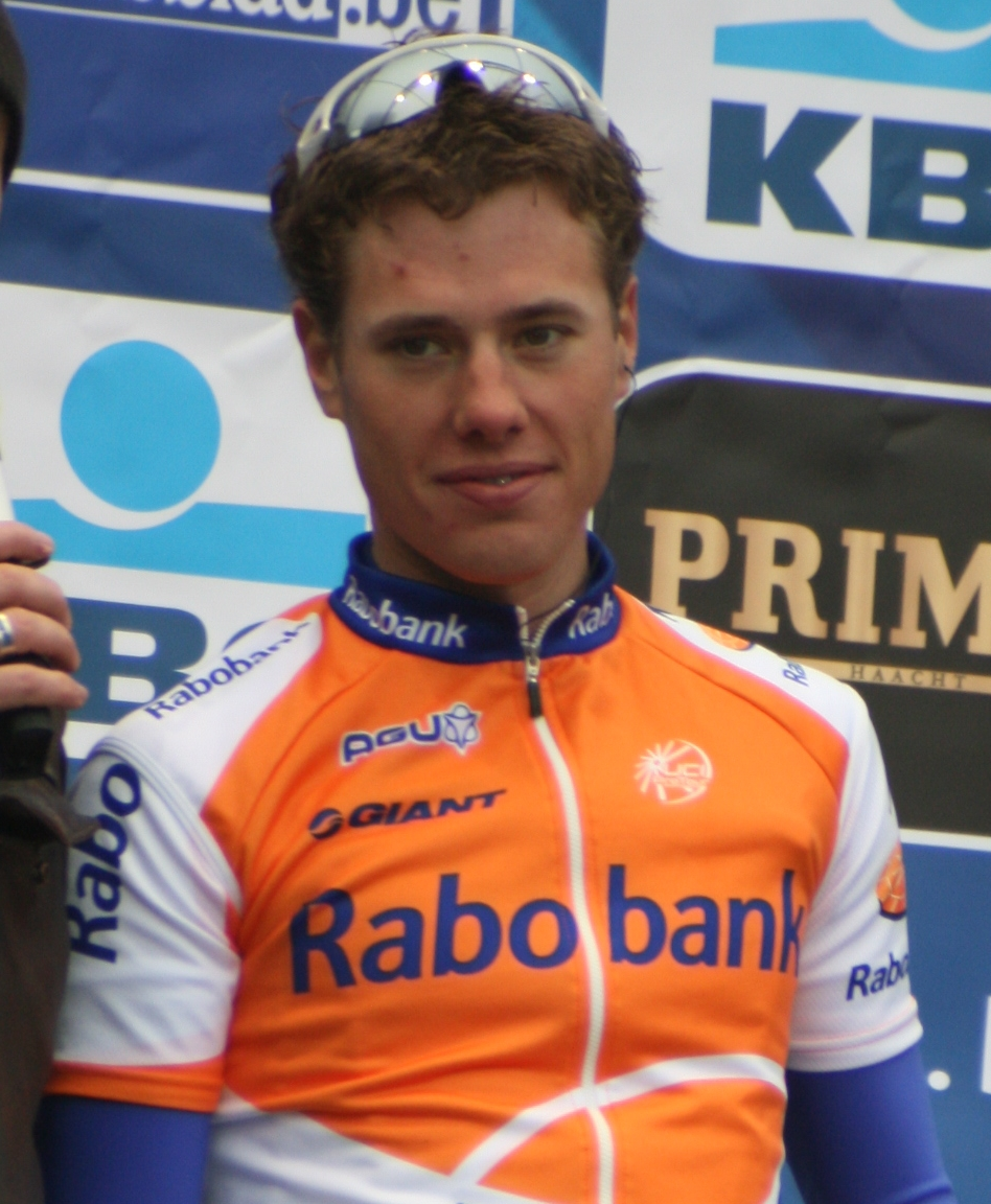 Sebastian Langeveld au départ du Tour des Flandres 2009